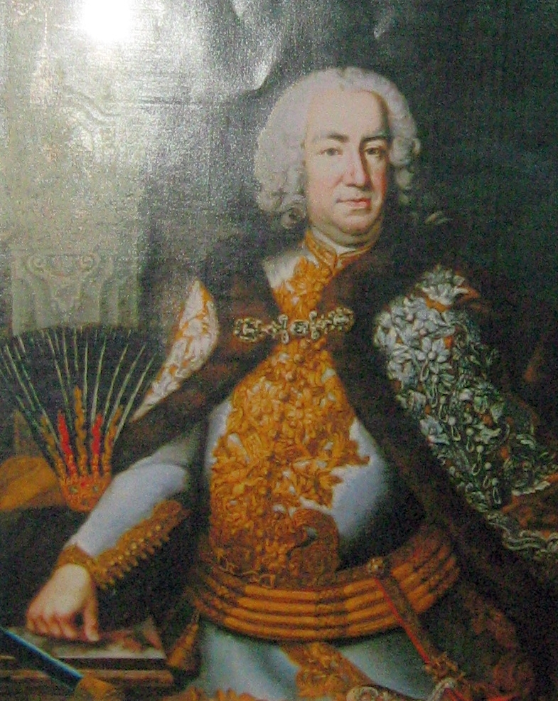 Esterházy József portréja a Tatabányai Múzeumban